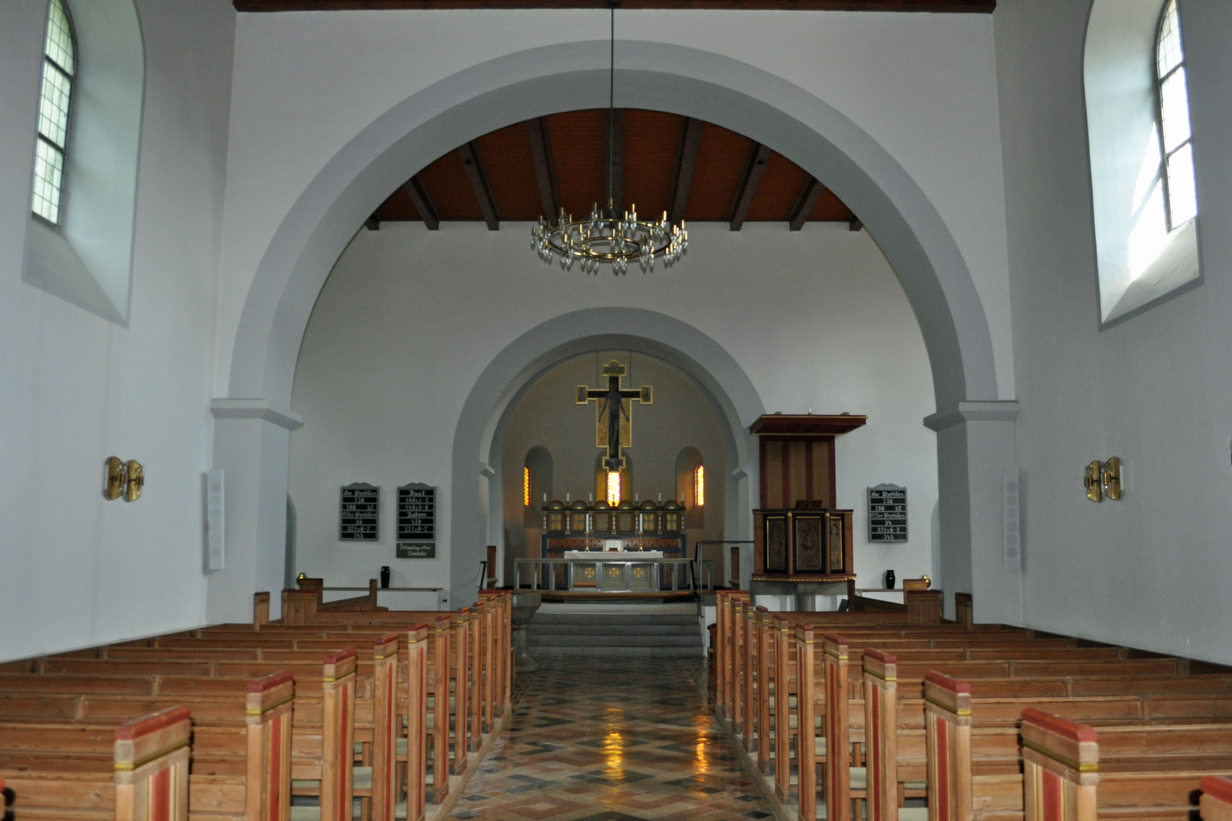 Østermarie Kirche, Bornholm (2012-07-11), by Klugschnacker in Wikipedia (16)